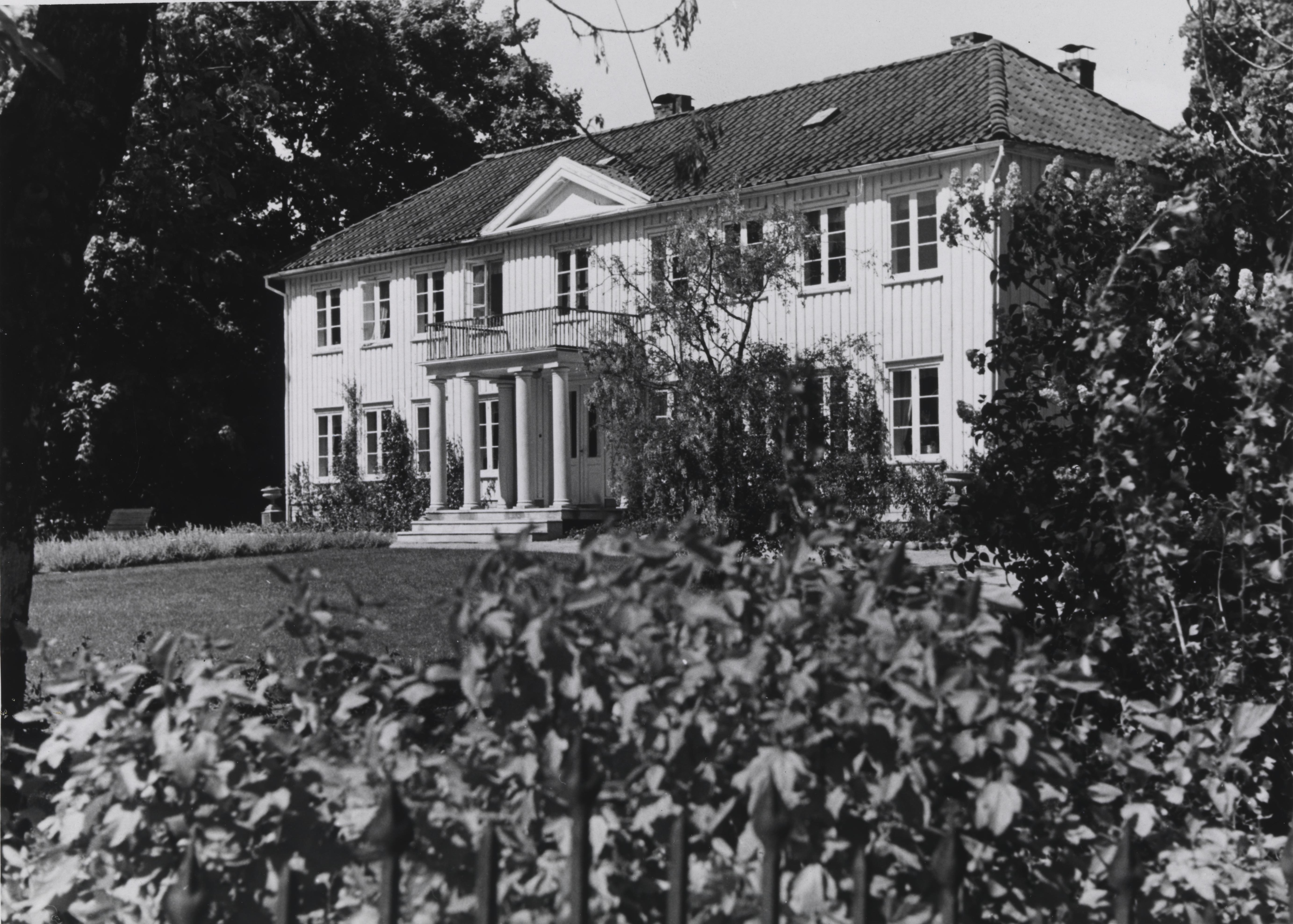 Bildet er hentet fra Nasjonalbibliotekets bildesamling Nørholm, Grimstad, Aust-Agder